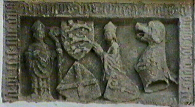 Wappen über einem Tor von Mörnsheim